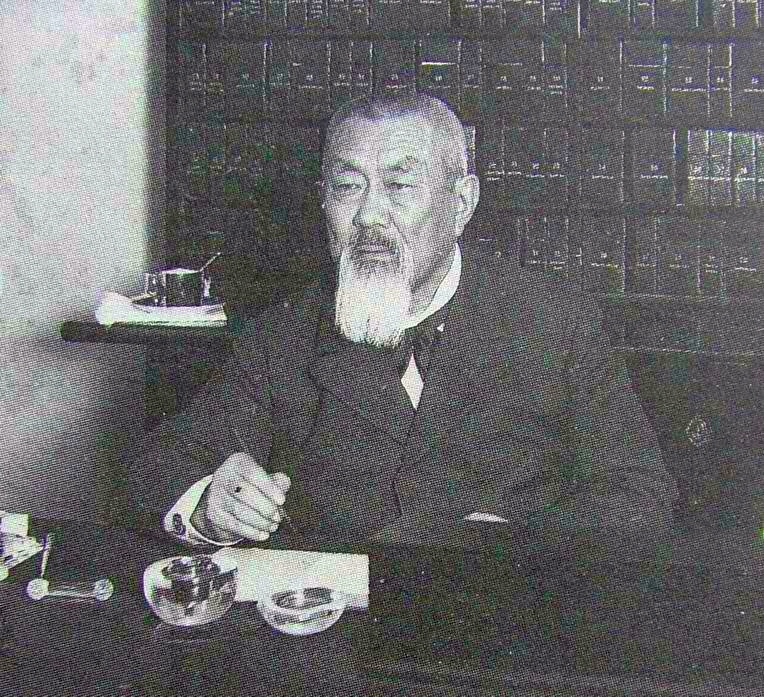 Врач тибетской медицины Пётр Алекса́ндрович Бадма́ев (Жамсаран) (1851—1920) у себя в кабинете (С-Петербург, буддийский храм)